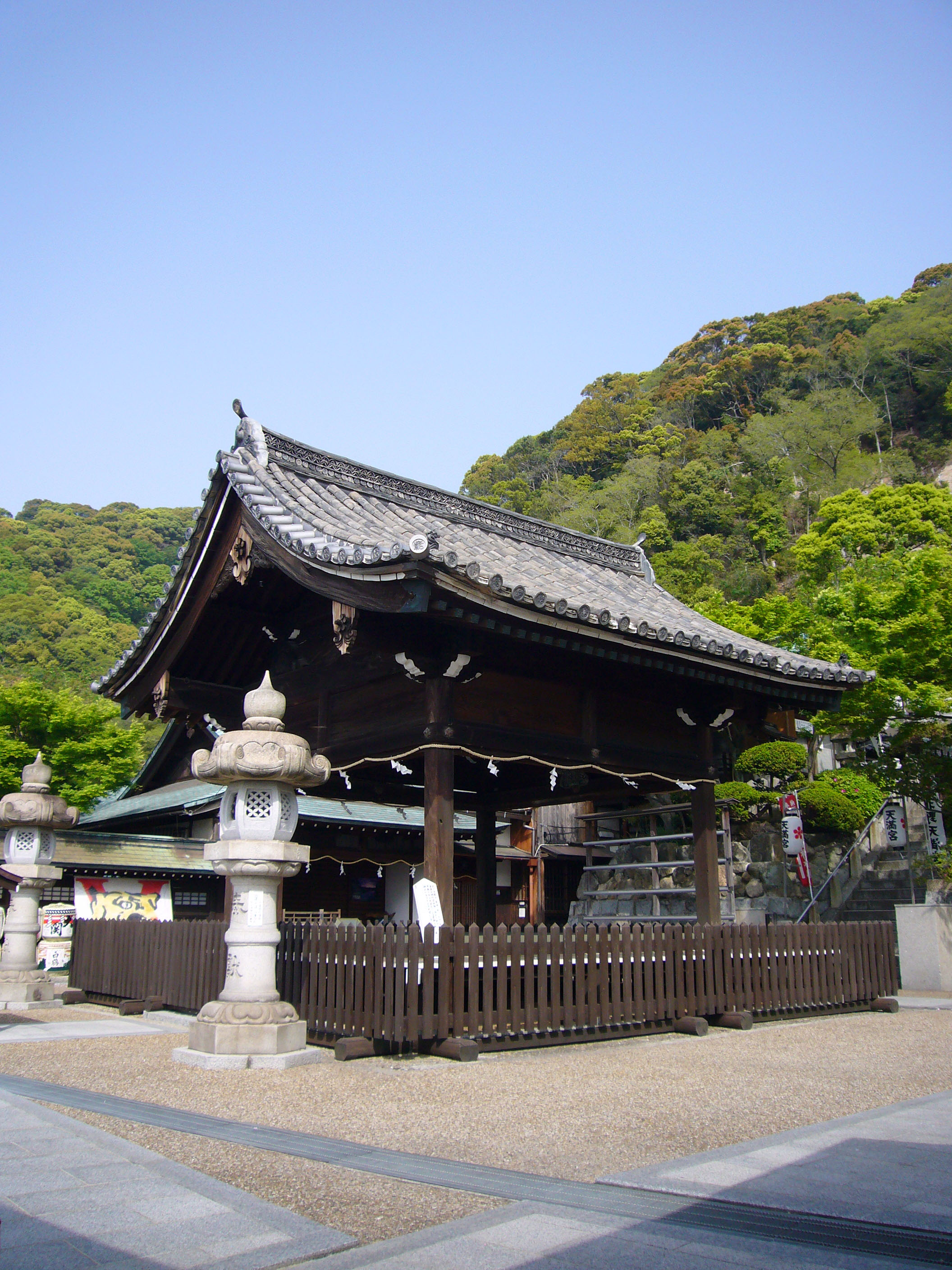 Kitano Tenma jinja in Kobe, Japan